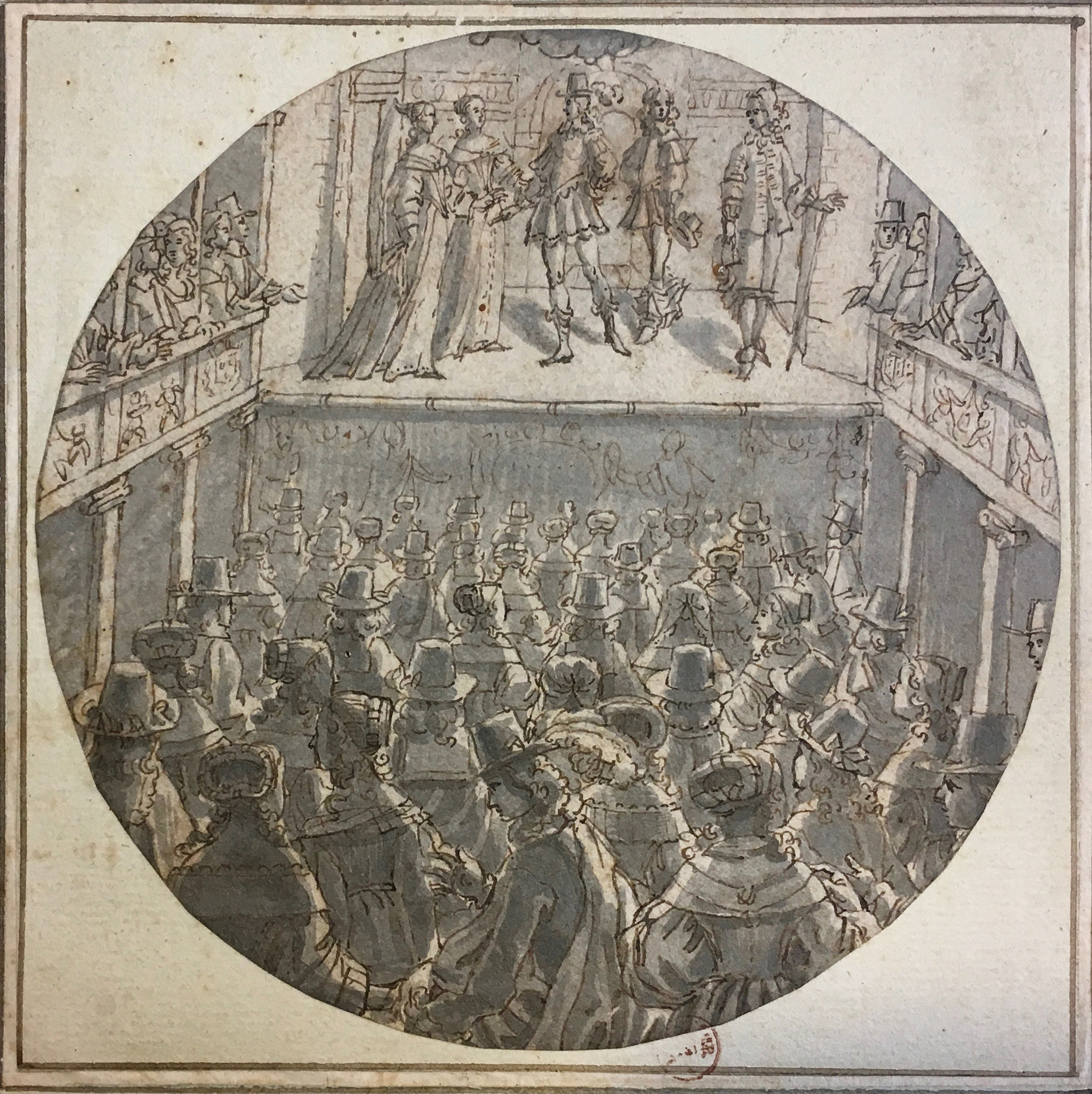 Un des quatre dessins préparatoires à l'écran rond de François Chauveau "Les agréables divertissements de la Cour", conservé à la BnF, Hennin 2283.